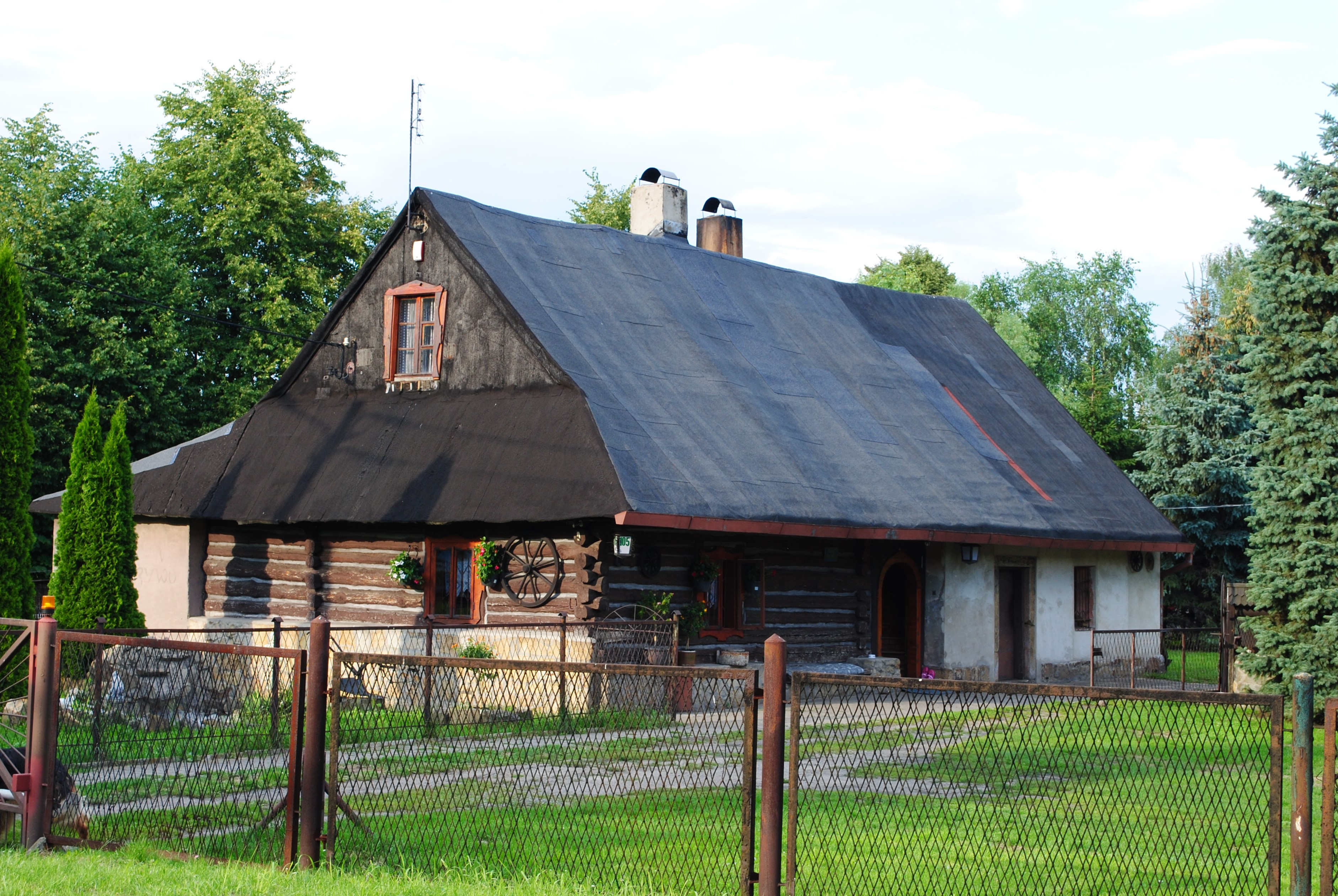 Katowice - Janów-Nikiszowiec Ul. Oswobodzenia